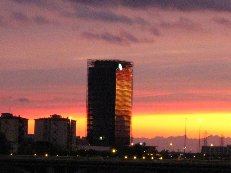 Torre Caja Badajoz. Noviembre de 2011